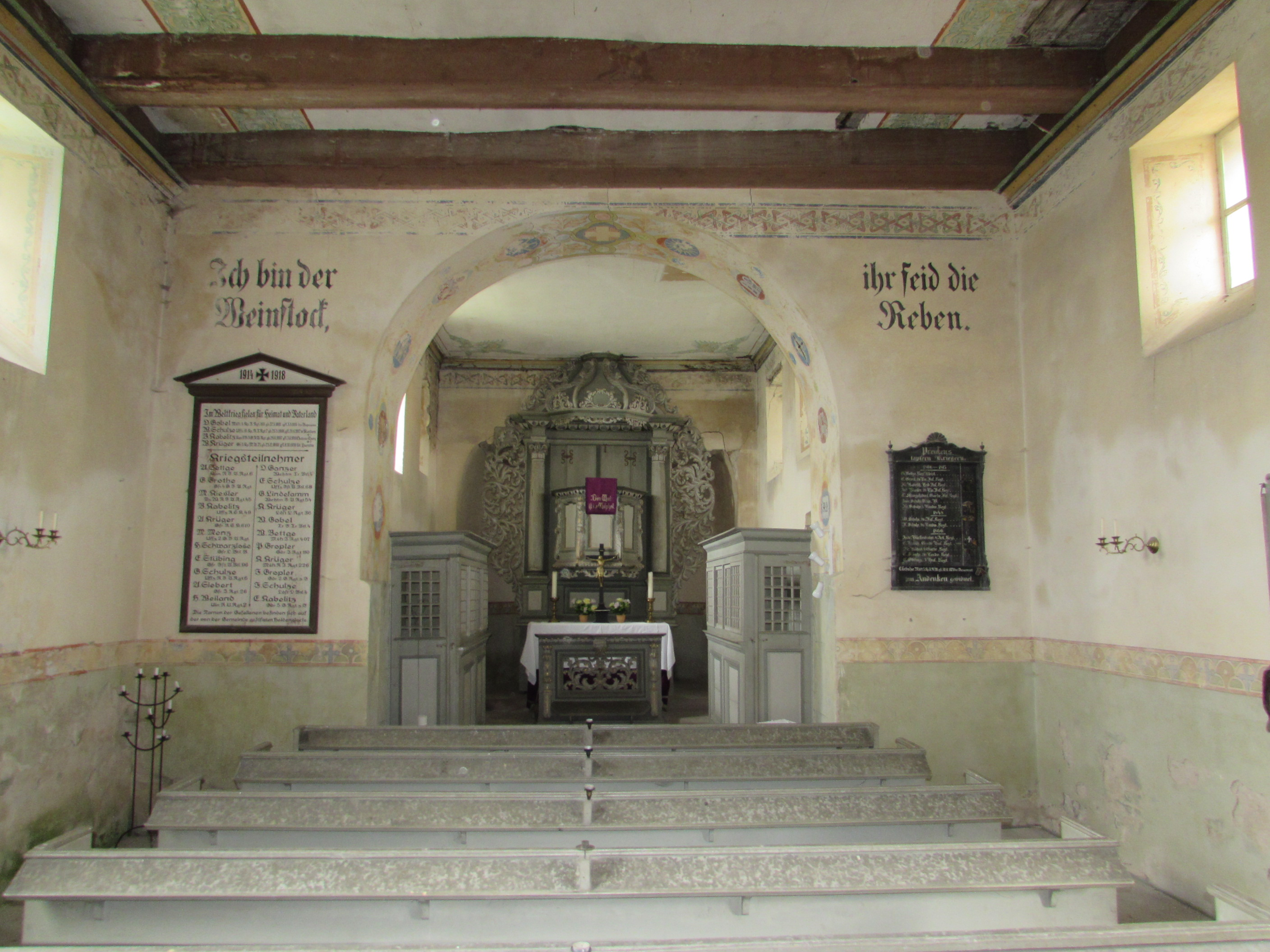 dorfkirche gollwitz (rosenau) innen